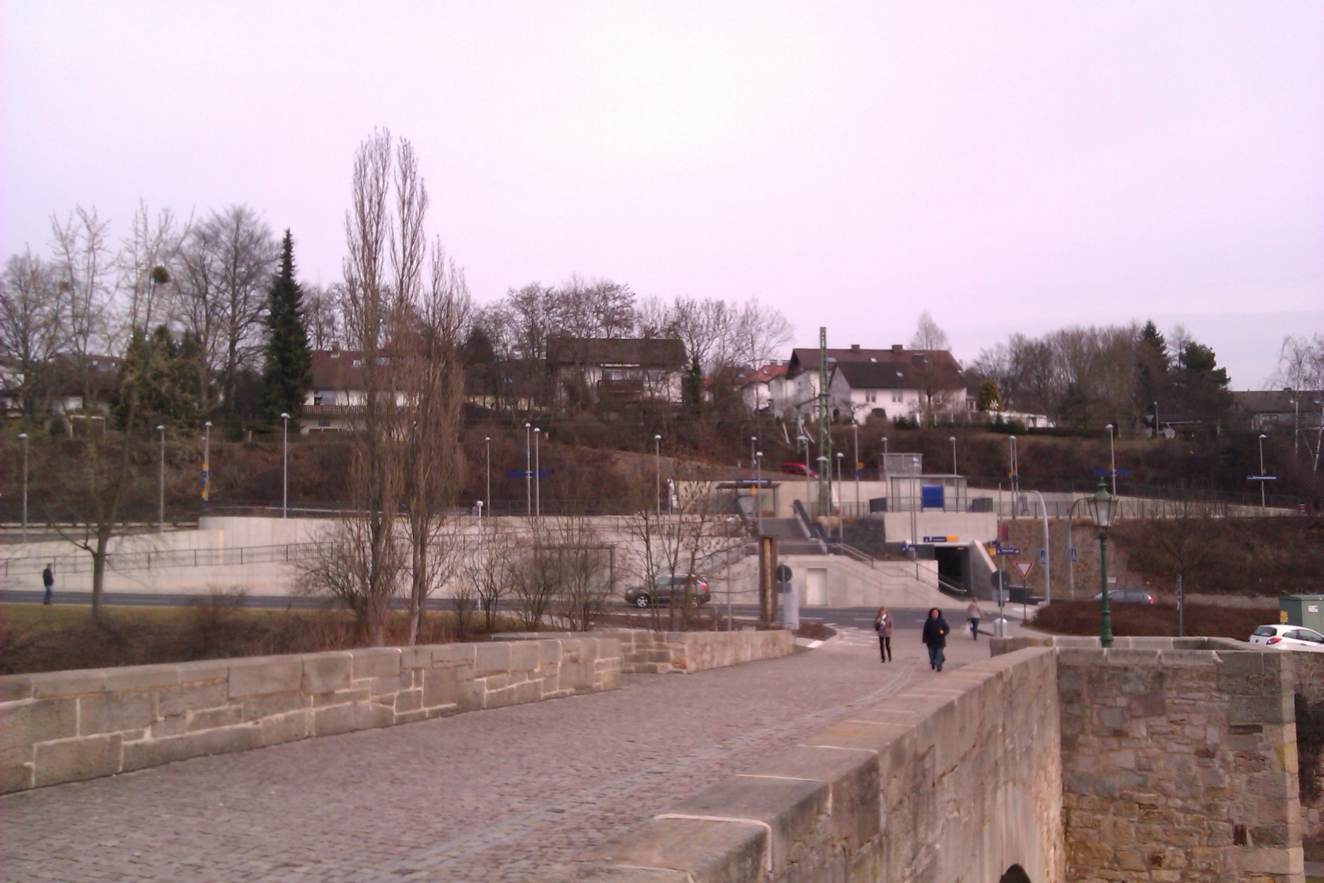 Der neue Bahnhof Melsungen-Bartenwetzerbrücke